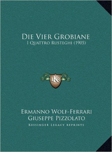 Die Vier Grobiane Titelblatt der Ausgabe von 1905